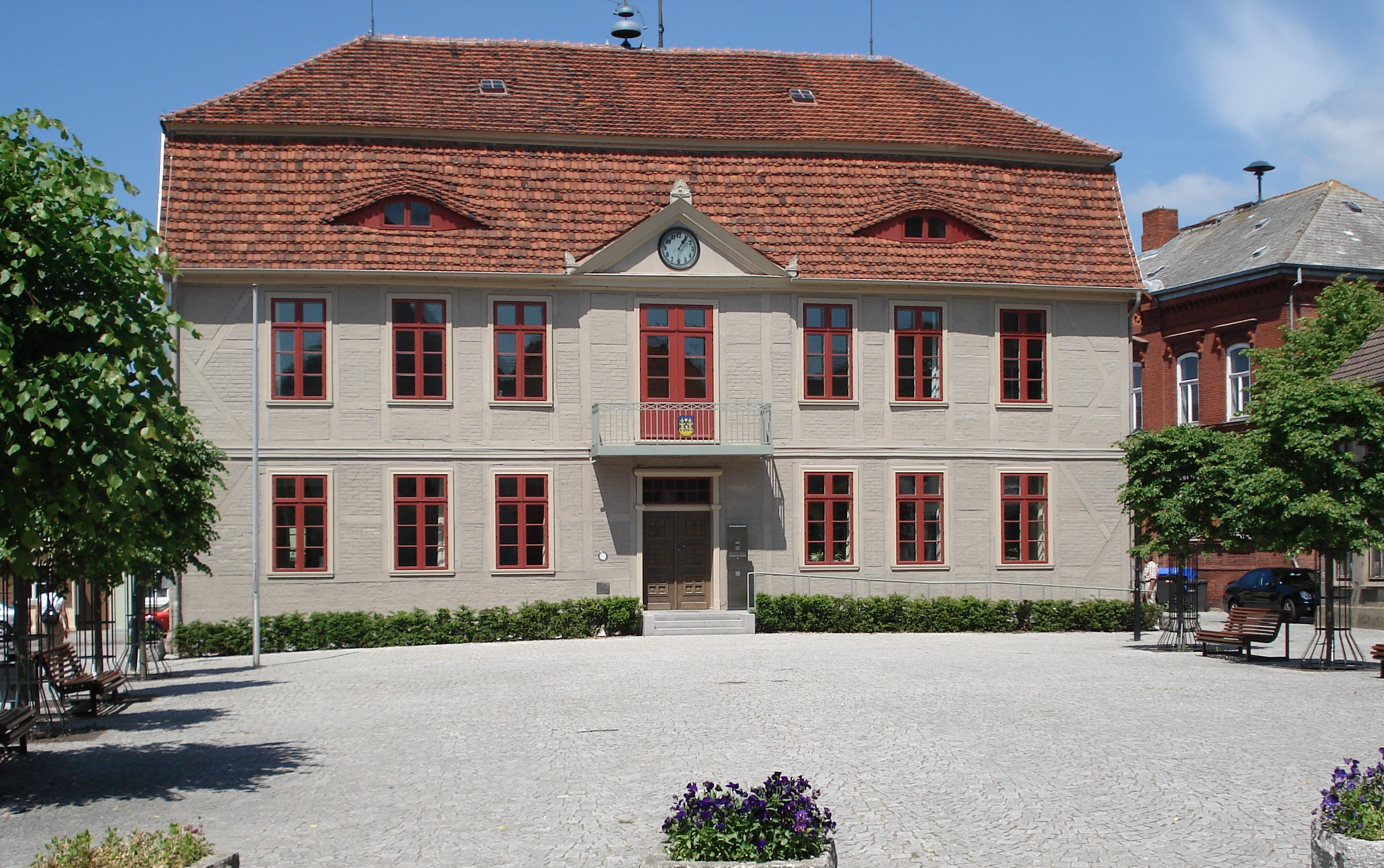 Rathaus der Stadt Malchow (Mecklenburg-Vorpommern)